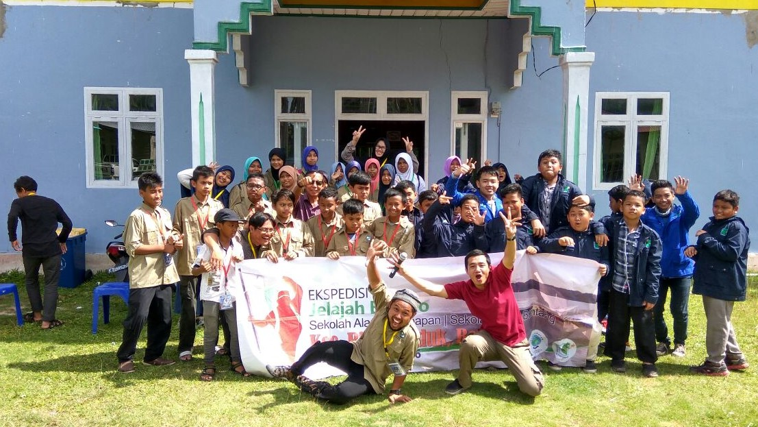 Kegiatan magang belajar siswa Madrasah Tsanawiyah Alam Al Hafidz yang dilasanakan di kecamatan biduk-biduk kabupaten berau kalimantan timur.